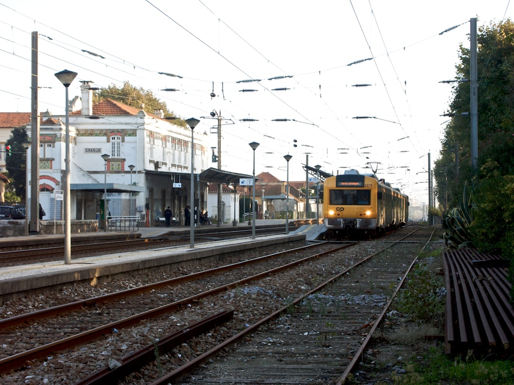 Tipo: Comboio Urbano 15981 [Granja - Porto • Campanhã] Local: Estação da Granja [Linha do Norte, PK 320] Data e hora: 15 de Outubro de 2008 [17h59] Material: Automotora 2279 [Unidade Tripla Eléctrica]